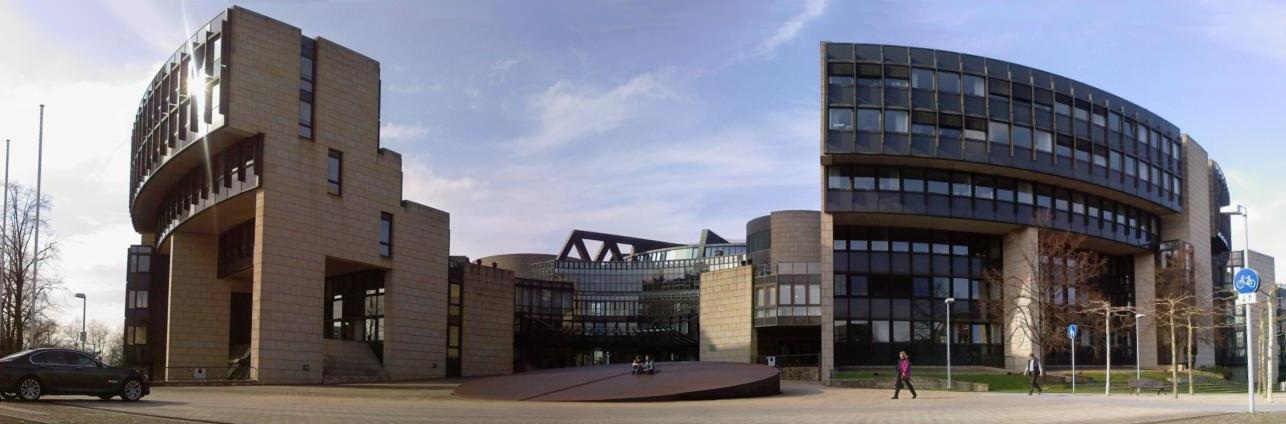 Landtag Nordrhein-Westfalen, Düsseldorf, Germany